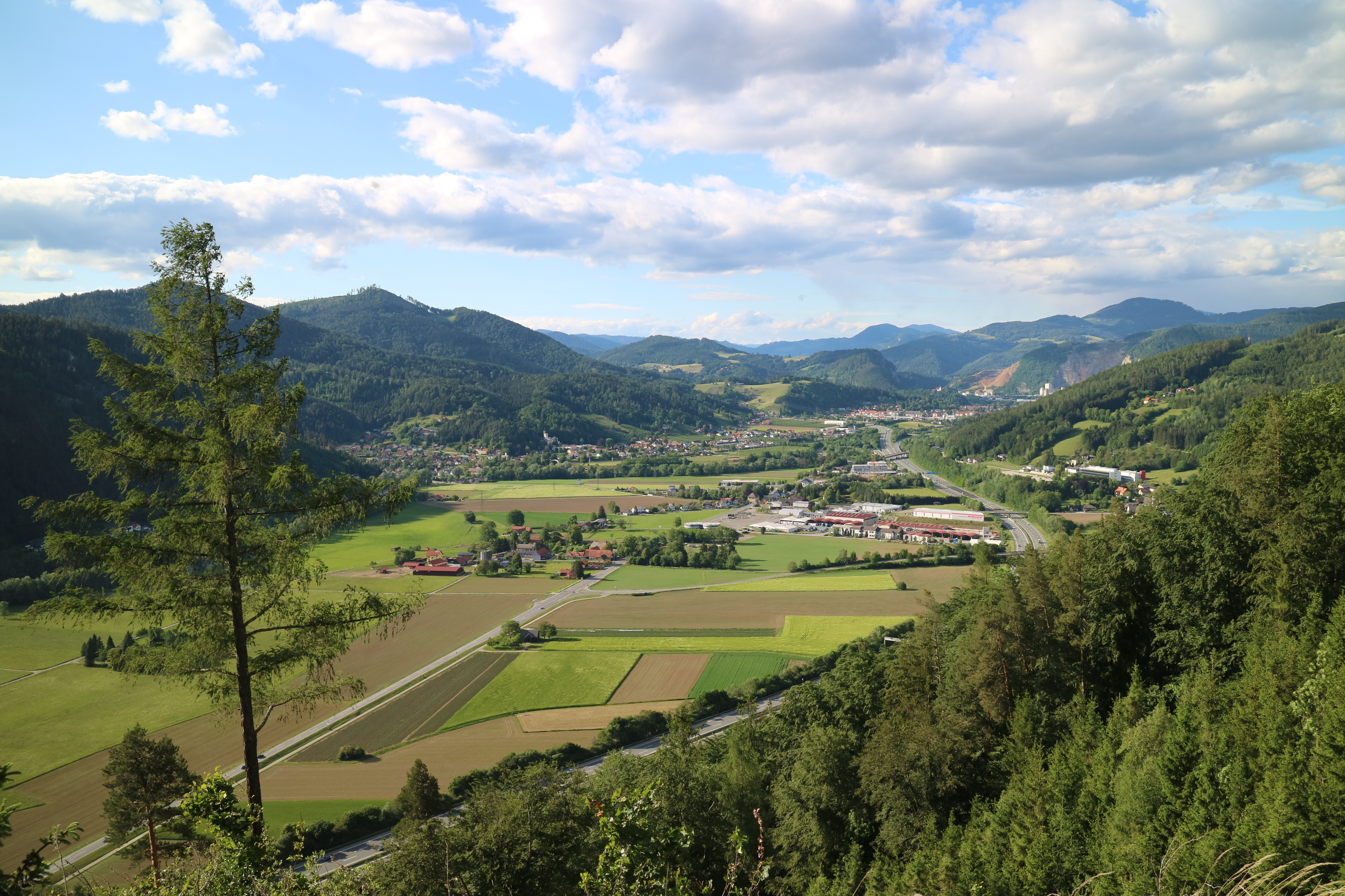 Blick von der Westflanke des Eggenberges ins Mittlere Murtal bei Friesach, Grazer Bergland, Steiermark